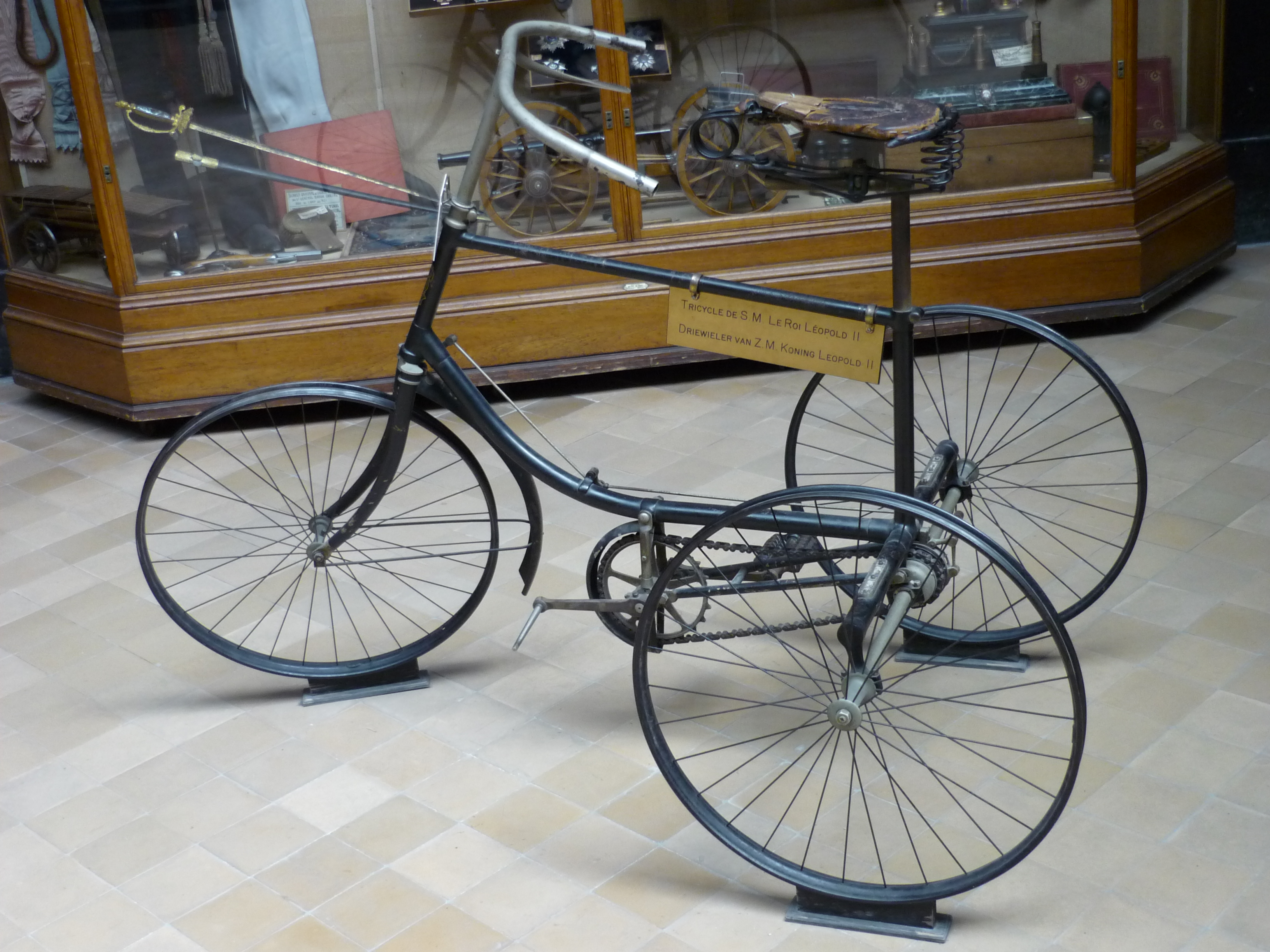 Tricycle de Léopold II de Belgique, Musée du Cinquantenaire, Bruxelles, Belgique. Royal Museums of Art and History Native nameMusées royaux d’art et d’histoireLocationBrusselsCoordinates50° 50′ 25.85″ N, 4° 23′ 35.37″ E Established1835Website